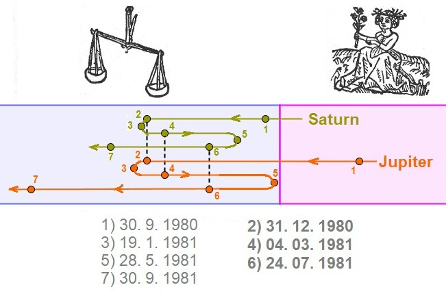 Schéma illustrant la répétition de la conjonction Jupiter-Saturne de 1981